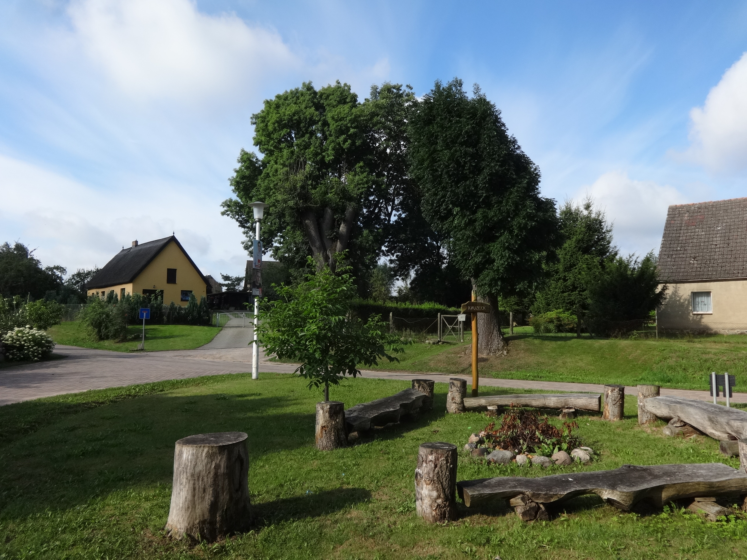 Kühlenhagen, ein Ortsteil der Gemeinde Katzow im Landkreis Vorpommern-Greifswald, Mecklenburg-Vorpommern